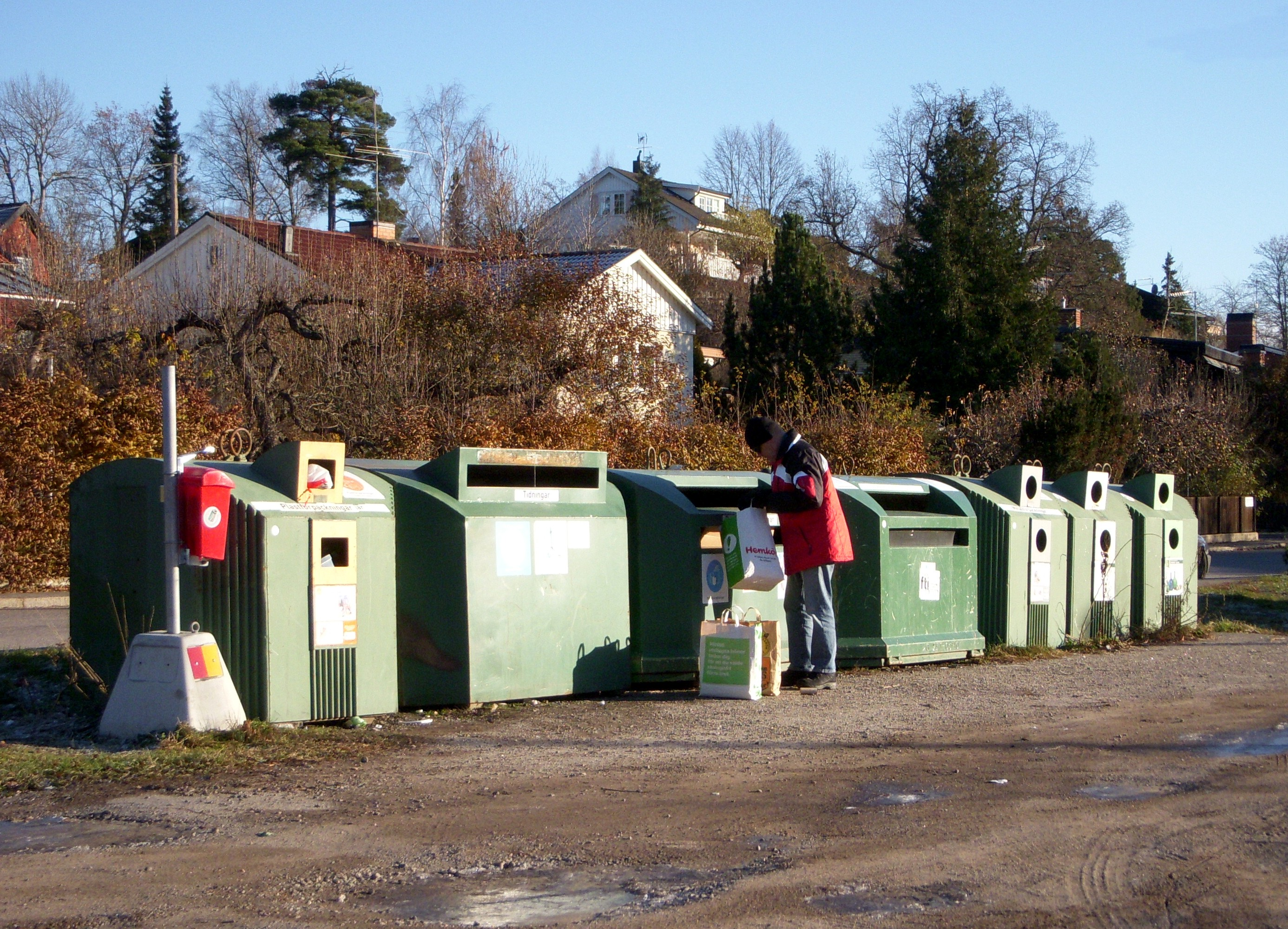 Återvinningsstation vid Segeltorpsvägen i Stockholm